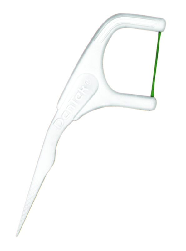 Floss Pick